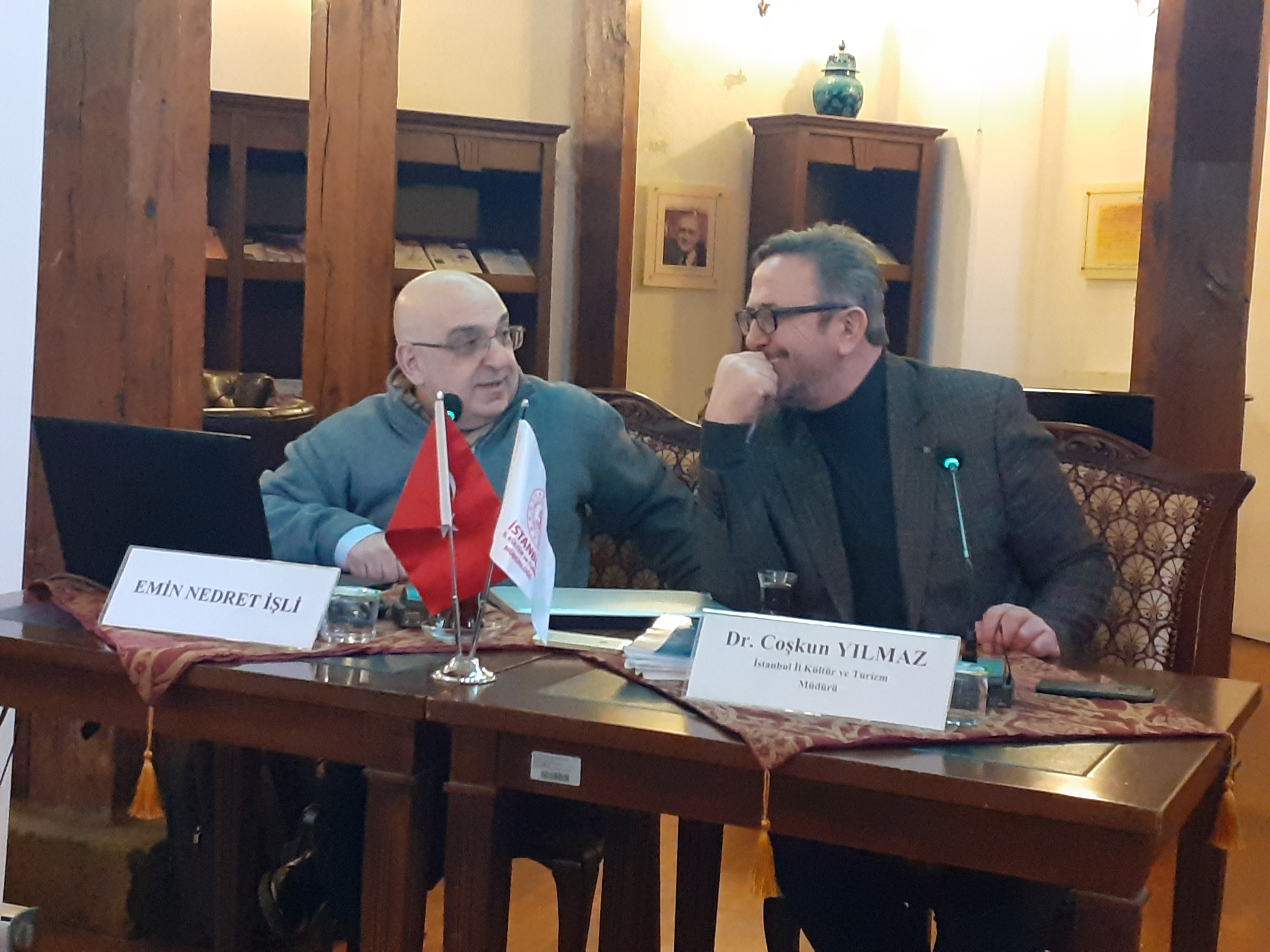 Emin Nedret İşli ve Dr. Coşkun Yılmaz Bâbıâli Konuşmaları'nda.